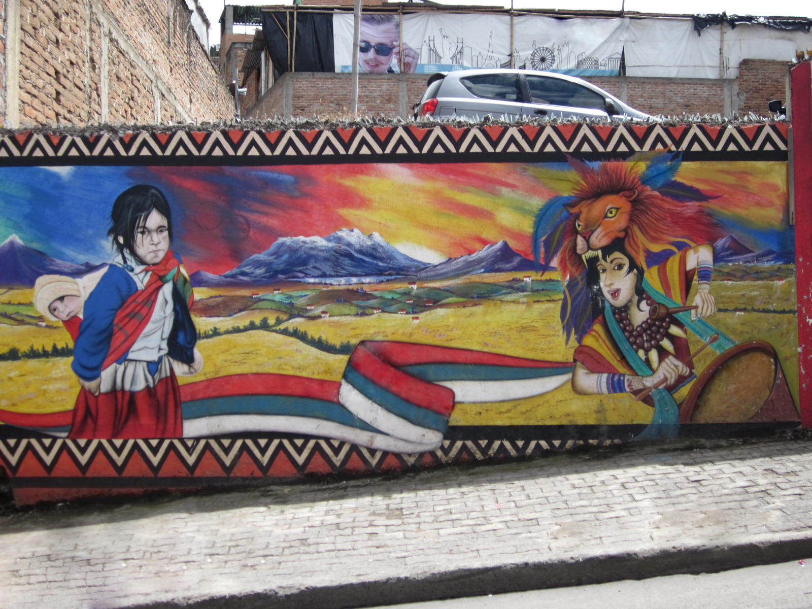 Mural en Ipiales (Nariño-Colombia): pintura callejera representa el paisaje andino, la niña mestiza, el carnaval local, los volcanes, la bandera del municipio.